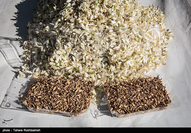 بهار نارنج، شکوفه درخت نارنج است که در عطرسازی و ساختن اسانس ، انواع نوشیدنی‌های فصلی و عرقیجات و تهیه مربا، گز ، سوهان و ... کاربرد بسیار دارد.شیراز در اردیبهشت ماه ، با رایجه ی سحرانگیز بهار نارنج ، هر رهگذری را سرمست می‌کند به نحوی که این شهرشیراز را شهرِ بهارنارنج می‌نامند.